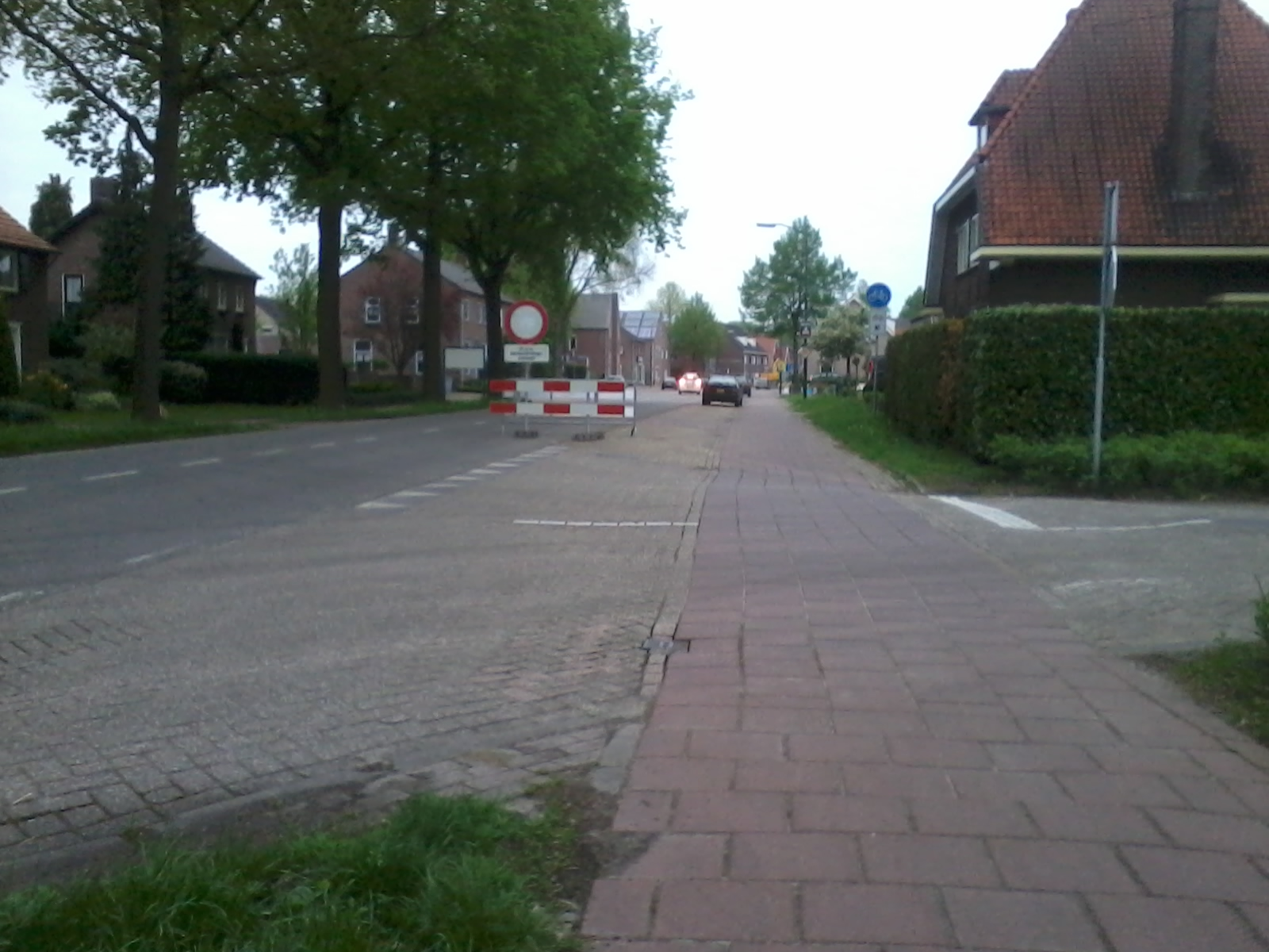 Wegafsluiting van een gedeelte van de N604 in Bakel, start van de herinrichting binnen de bebouwdekom